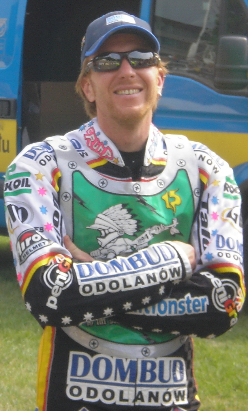 Jason Crump w Poznaniu